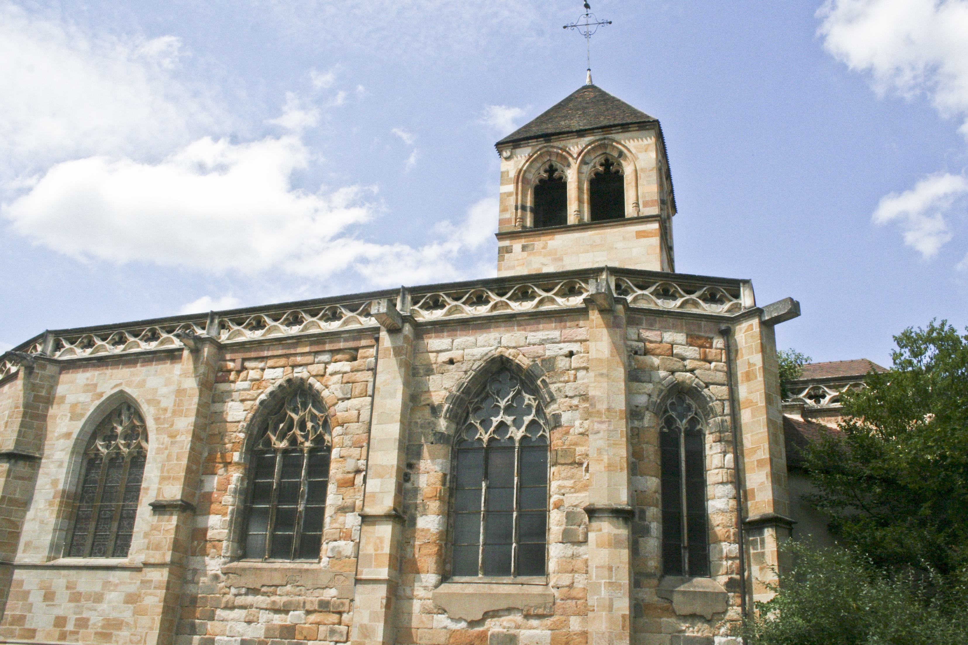 Cathédrale Notre-Dame de Montluçon, Allier, France.